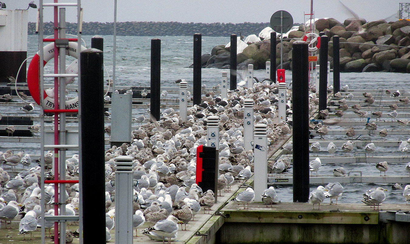 Gråtrut och Havstrut, unga och gamla individer samlade på "nattkvist" i Ystads småbåtshamn.